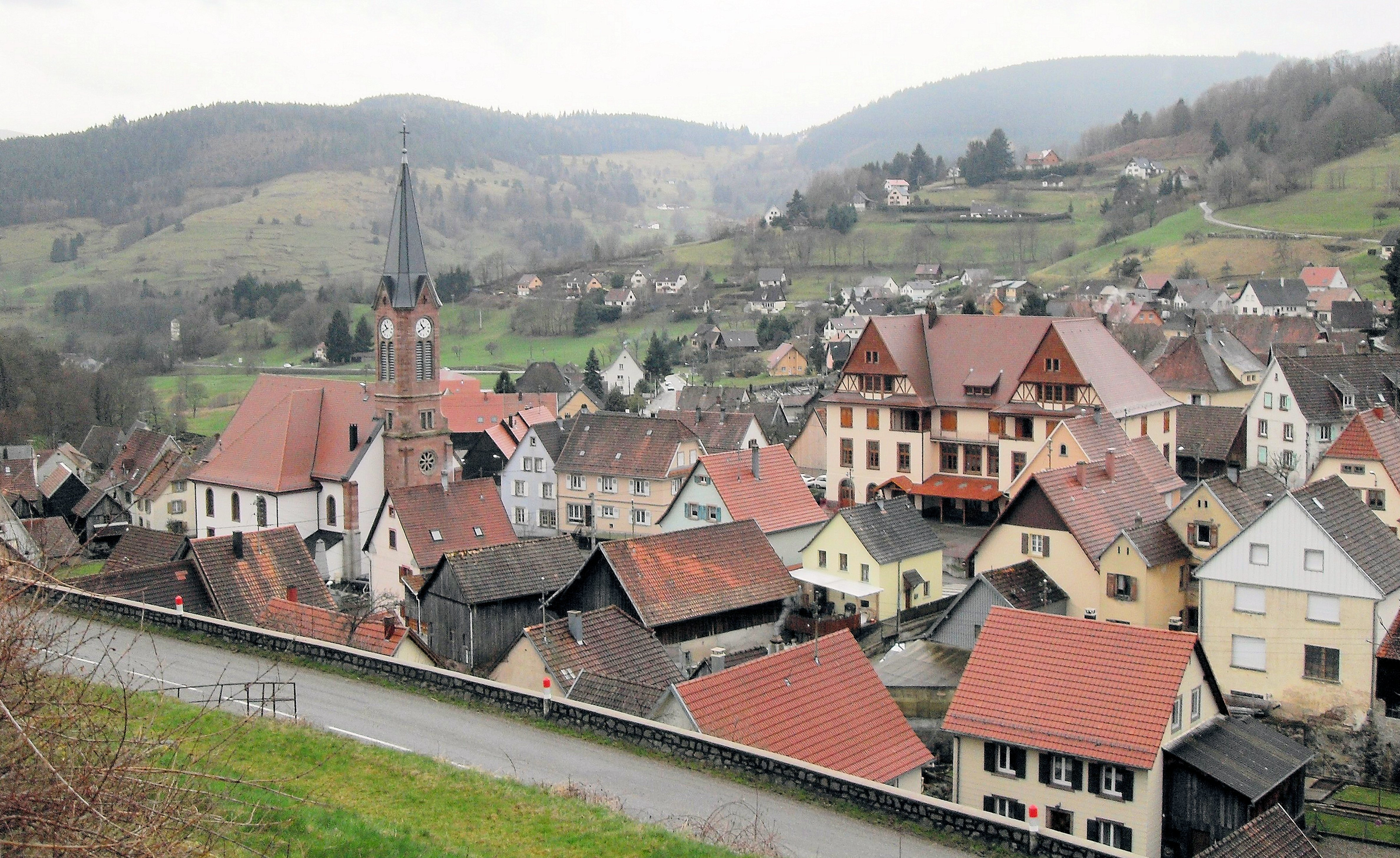 Vue de Soultzeren avec l'Église luthérienne